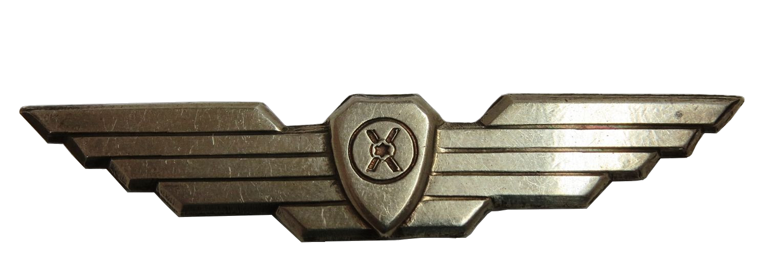 סיכת כנפיים של מהנדס ניסויי טיסה בחיל האוויר.